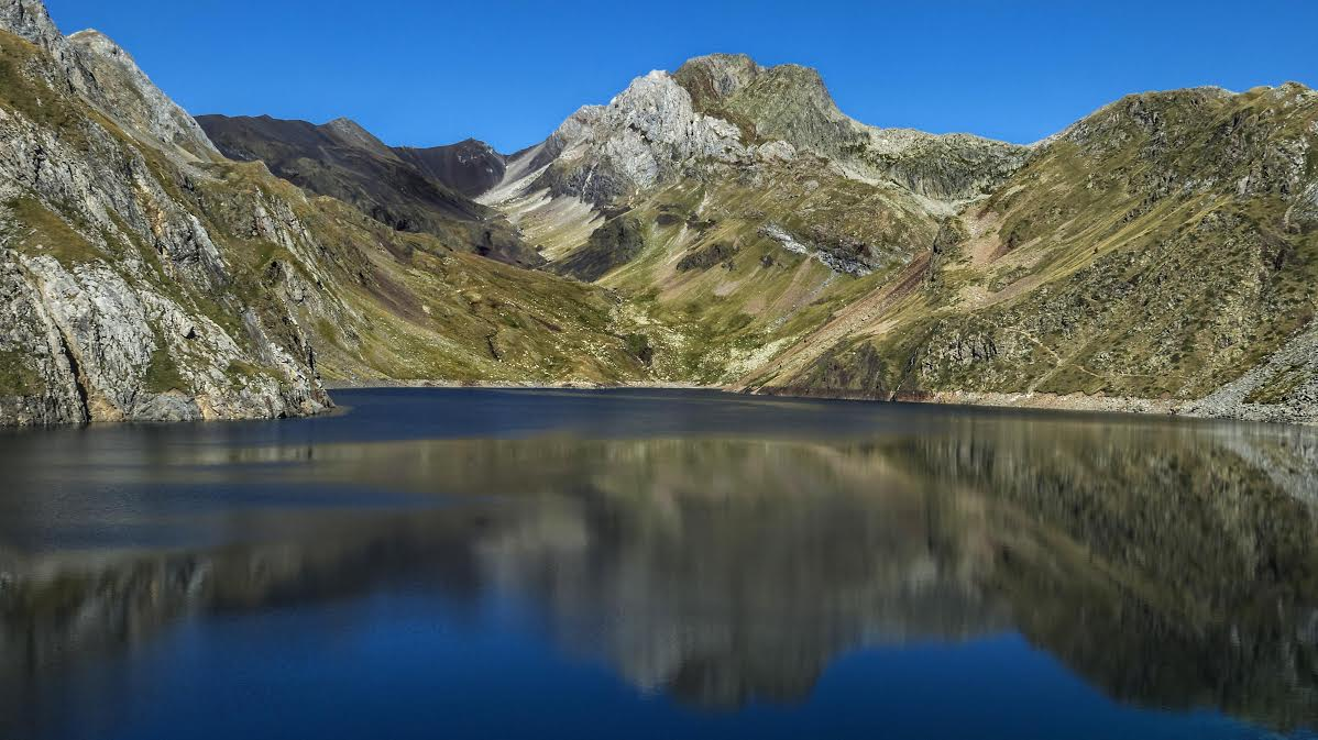 Estany de Llauset, d'origen glacial, a la capçalera de la Vall de Llauset, al municipi de Montanui (Ribagorça)